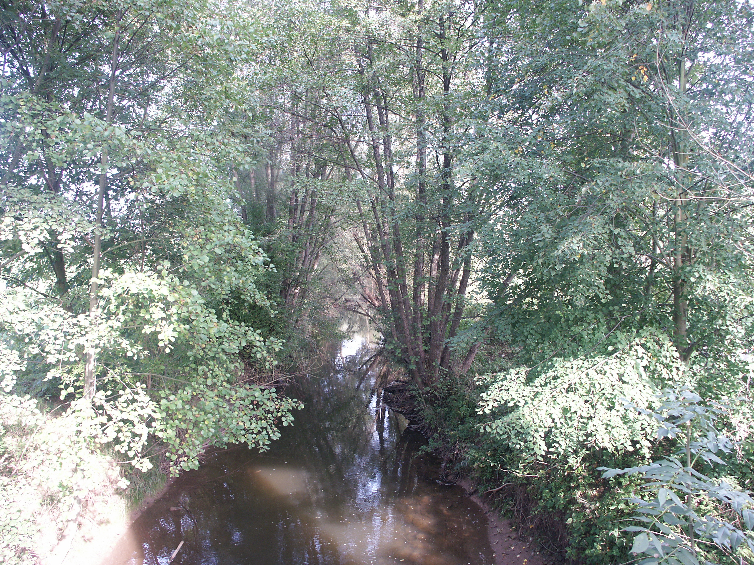 Die Aich zw. Aichtal-Neuenhaus und Aichtal-Grötzingen